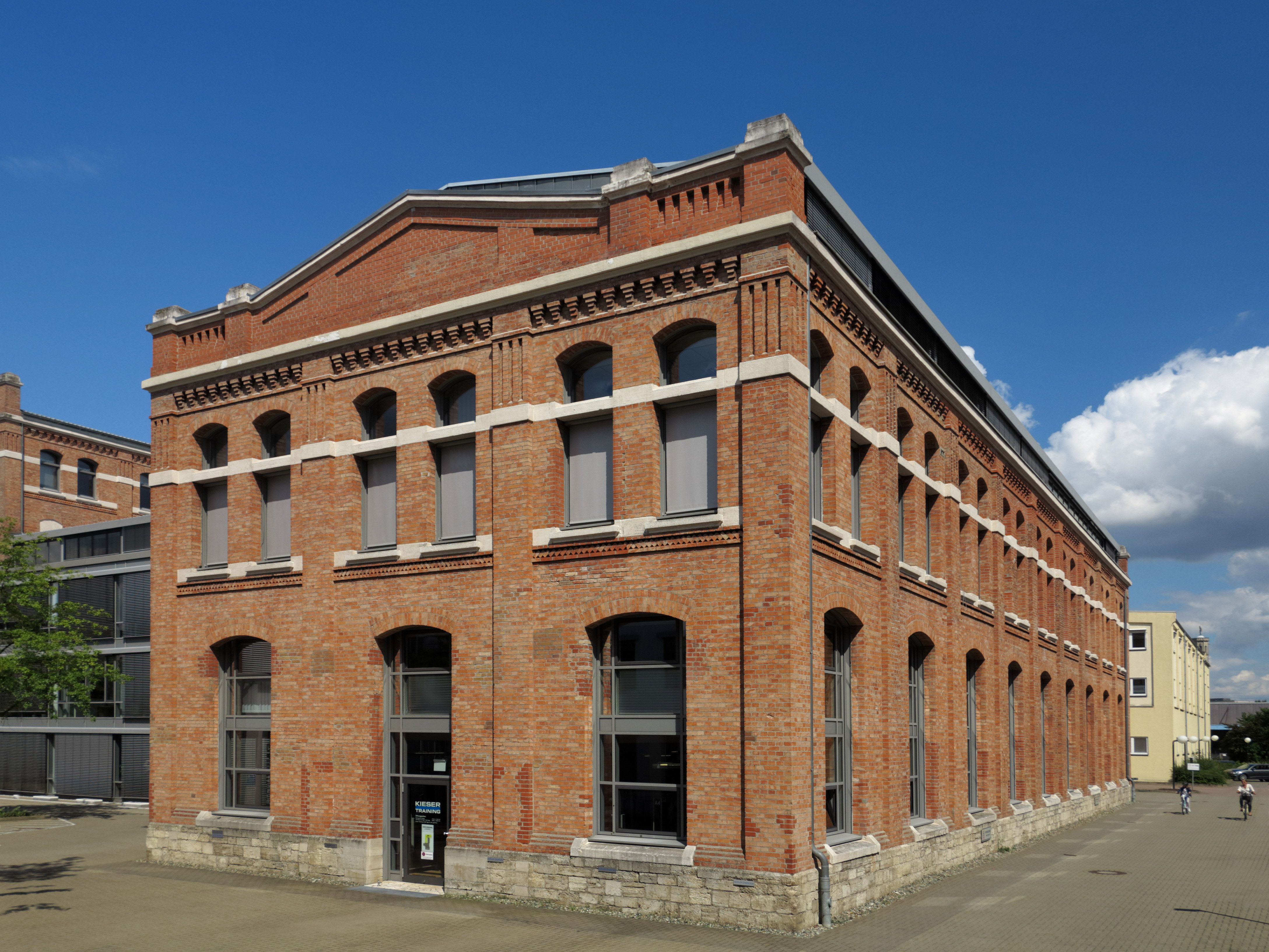 Braunschweig: Gebäudeteil der ehemaligen Zucker-Raffinerie.